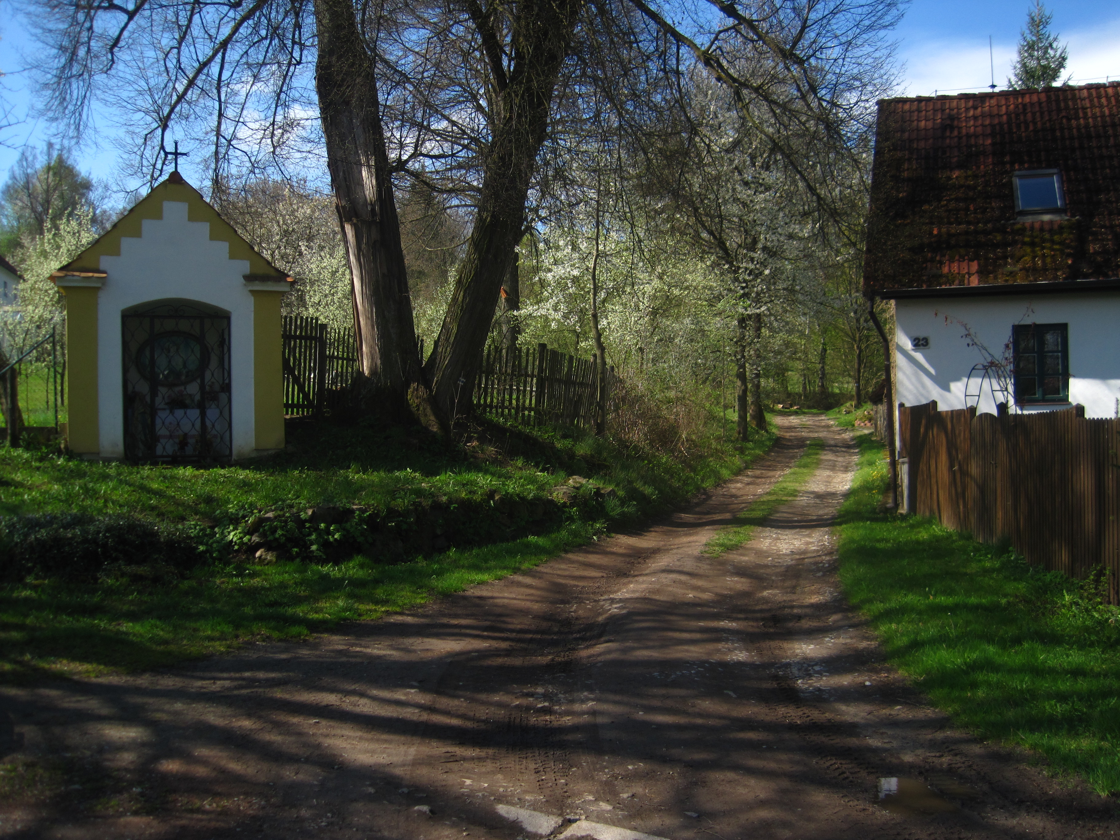 Konratice (Kainretschlag) u Horní Stropnice - střed vsi s kapličkou